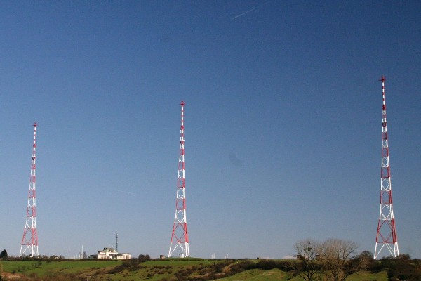 Sender Jonglënster vu Weste gesinn.